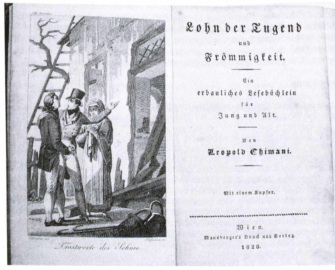 Leopold Chimani Lohn der Tugend und Frömmigkeit Wien 1828